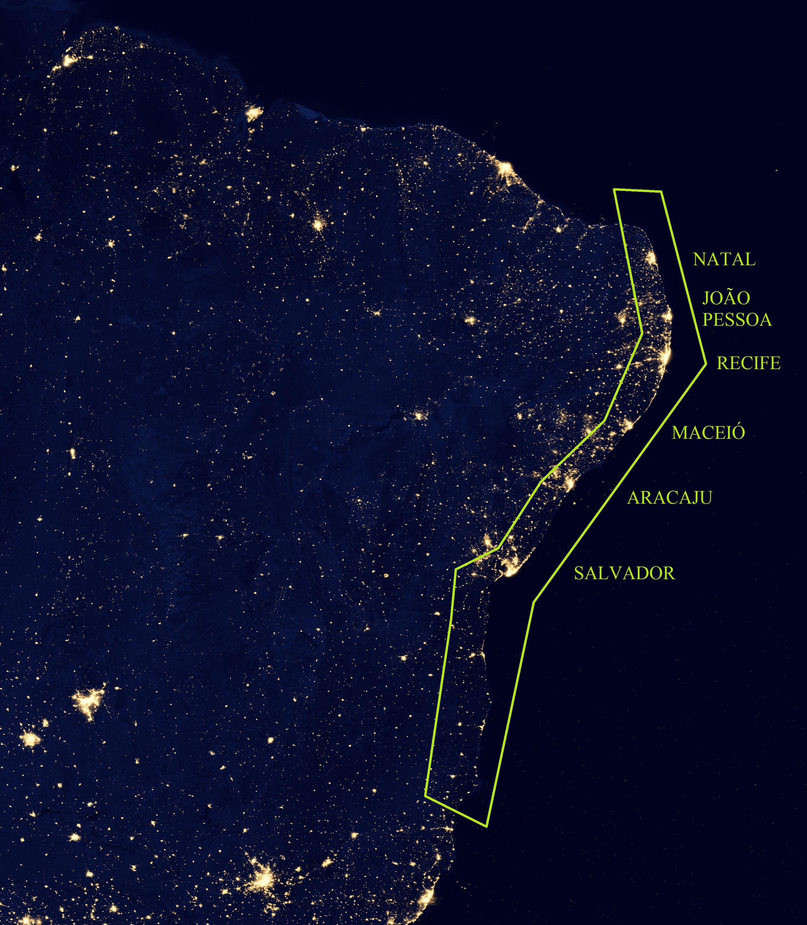 Luzes na sub-região da Zona da Mata da Região Nordeste do Brasil a noite.